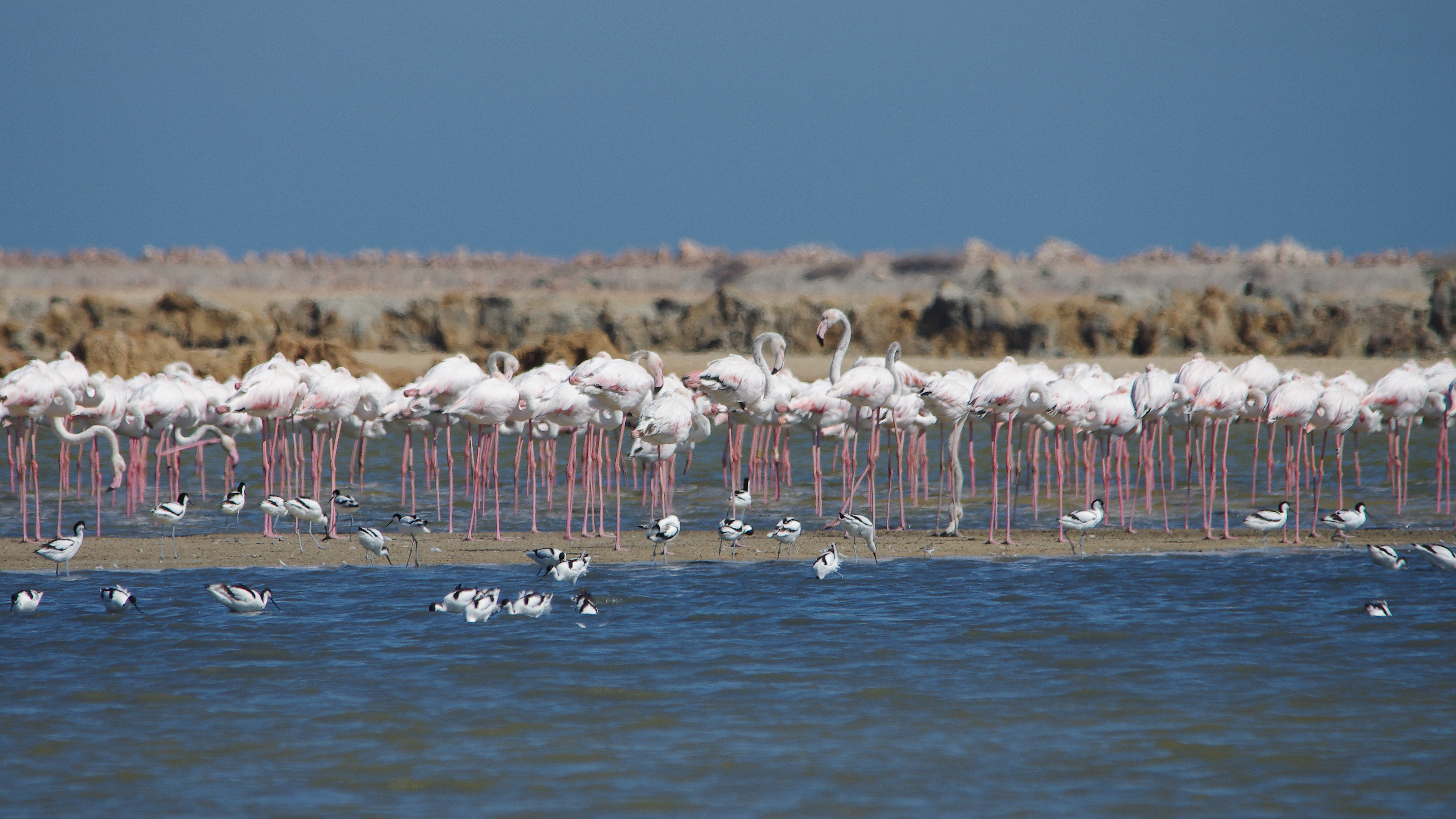 Salines de Thyna (site classé par la convention RAMSAR)